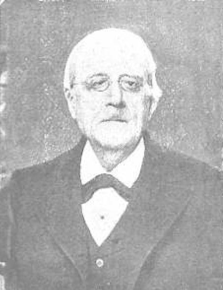 Eduardo Benot